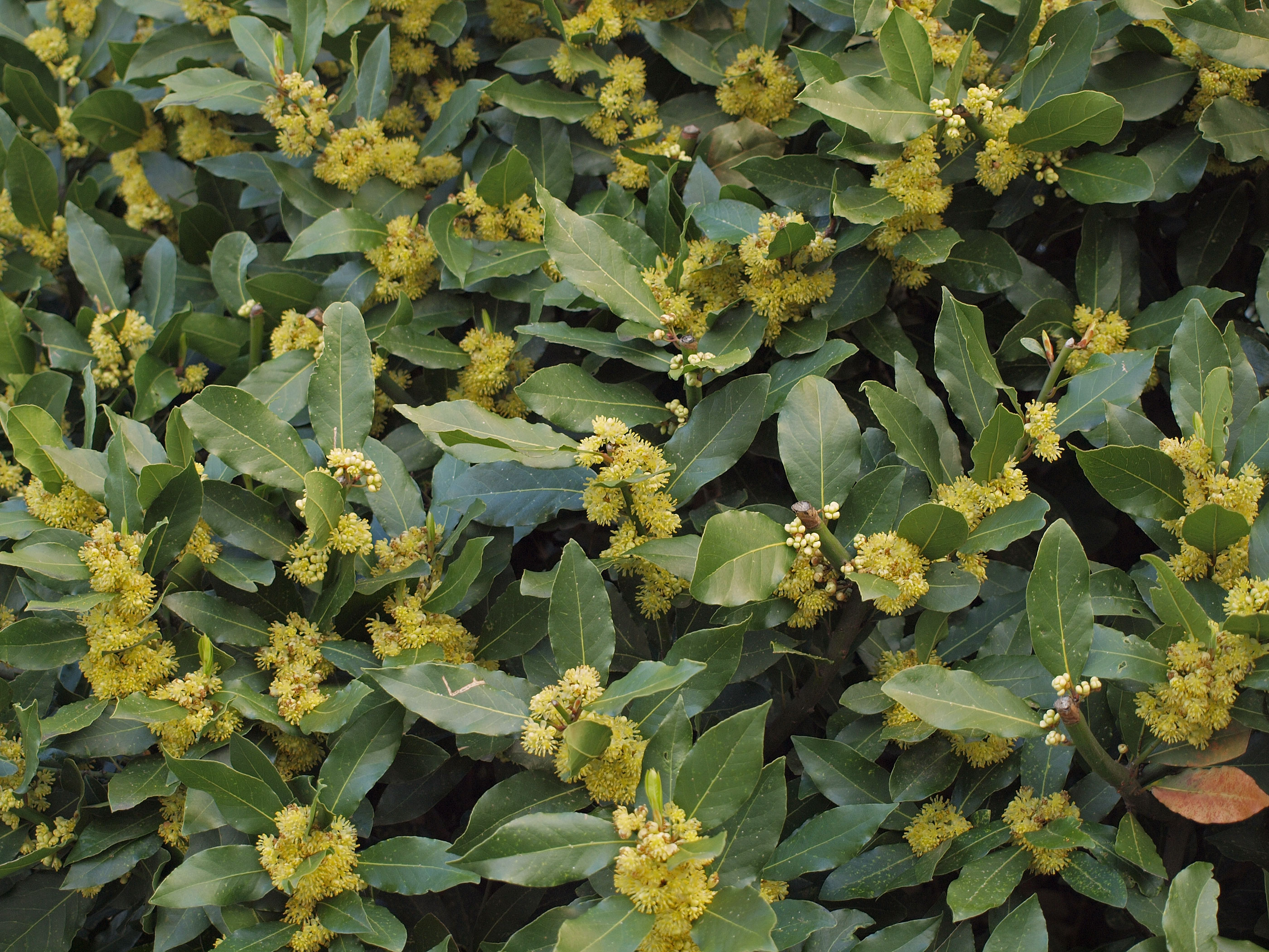 Laurus nobilis. Madrid, barrio de Peñagrande.